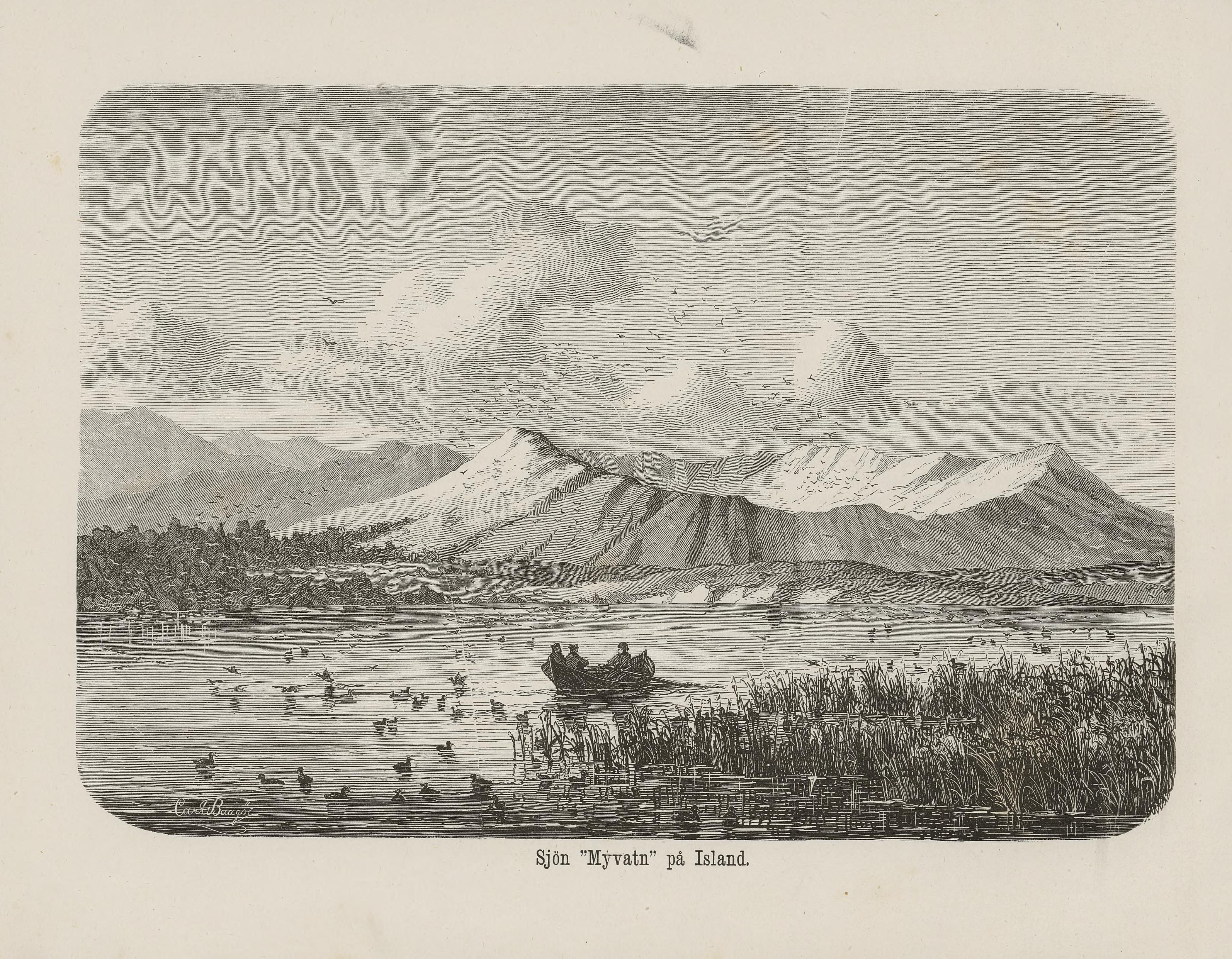 Illustrasjon hentet fra boken Nordiska taflor av ukjent forfatter og utgitt av Albert Bonnier (se, 1865)